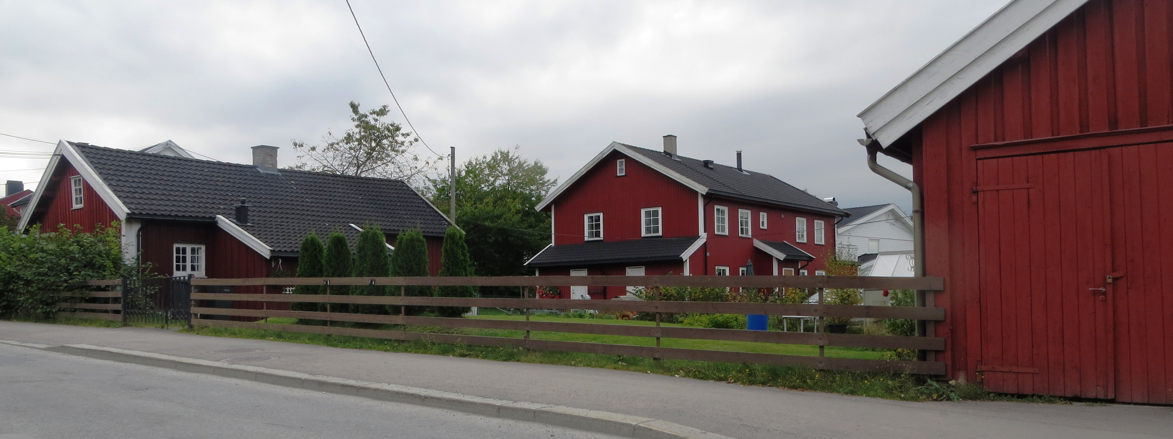 Tidligere husmannsplass ved Vækerøveien på Røa, bydel Vestre Aker, i Oslo.